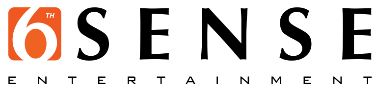 Logo của 6th Sense Entertainment